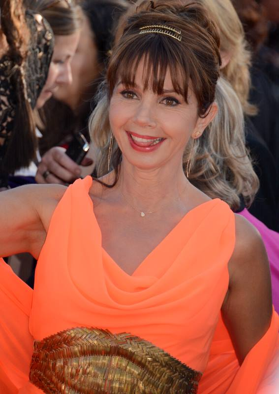 Victoria Abril au festival de Cannes